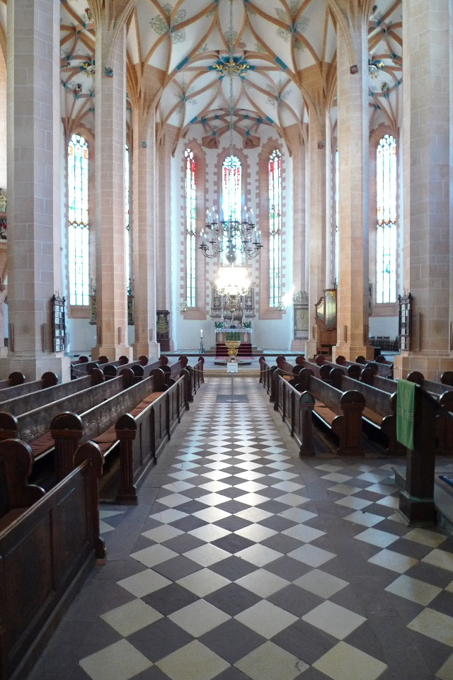 Mittelschiff der St.-Annen-Kirche